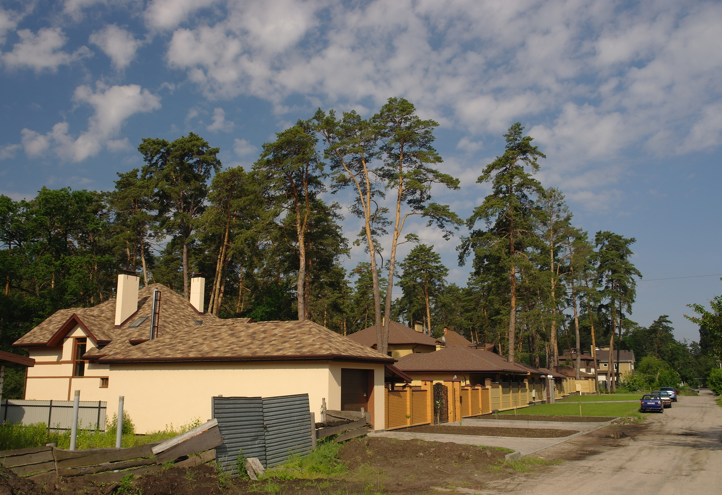 Закинутий Соснівський парк потрохи обростає котеджами..., м. Черкаси, мікрорайон «Соснівка», між вулицями Золотоніська, Мініна і Пожарського, Грузиненка, Ціолковського